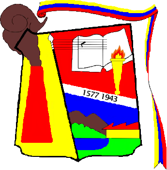 Escudo del municipio Sucre. Estado Aragua. Venezuela